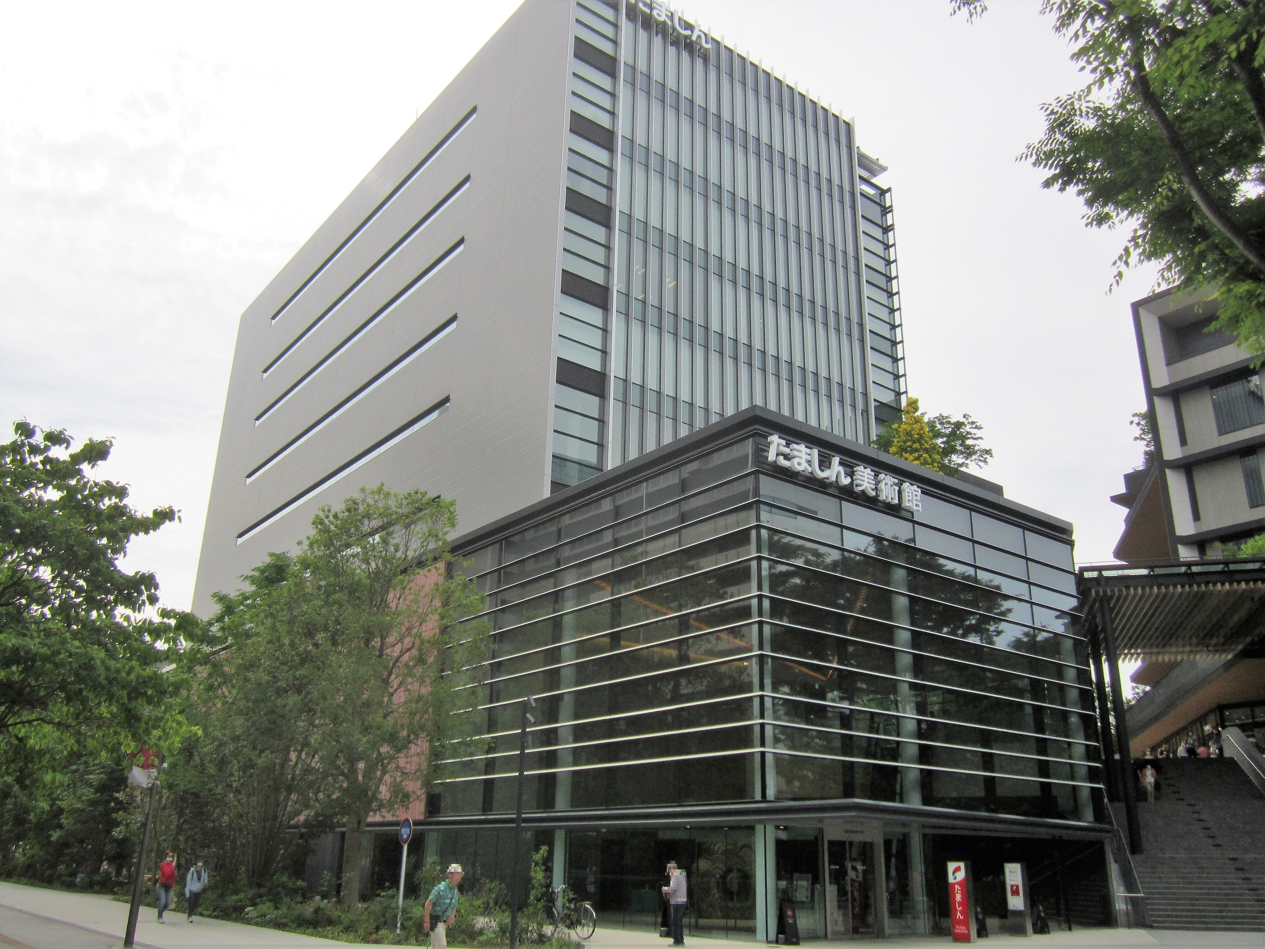 多摩信用金庫 本店（立川市緑町、2020年5月移転） Canon PowerShot A2200